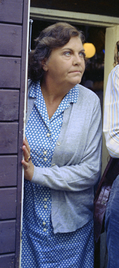 Riet Wieland Los in Q & Q